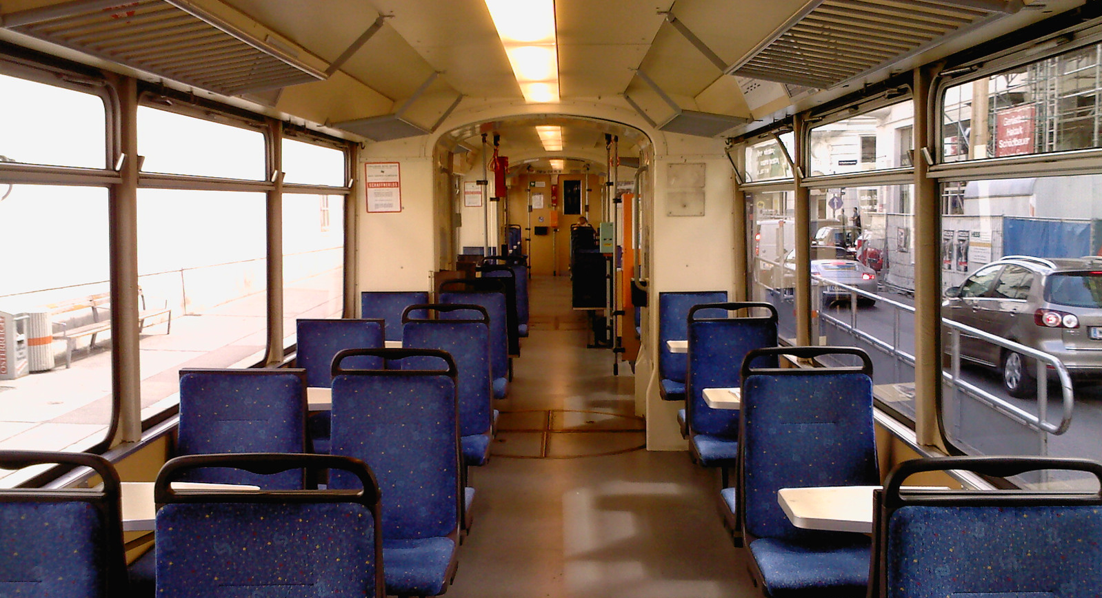 Lokalbahn 0125